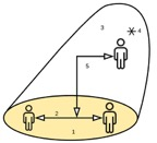 схема для статьи про позиционирование